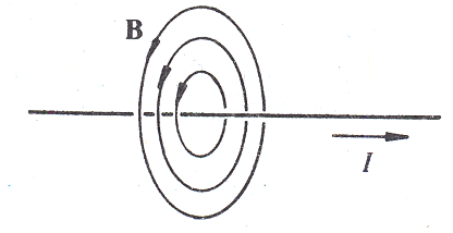 Korronte elektriko zuzen baten inguruko eremu magnetikoaren lerroak.